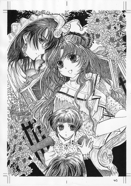 モノクロ作品の一つ